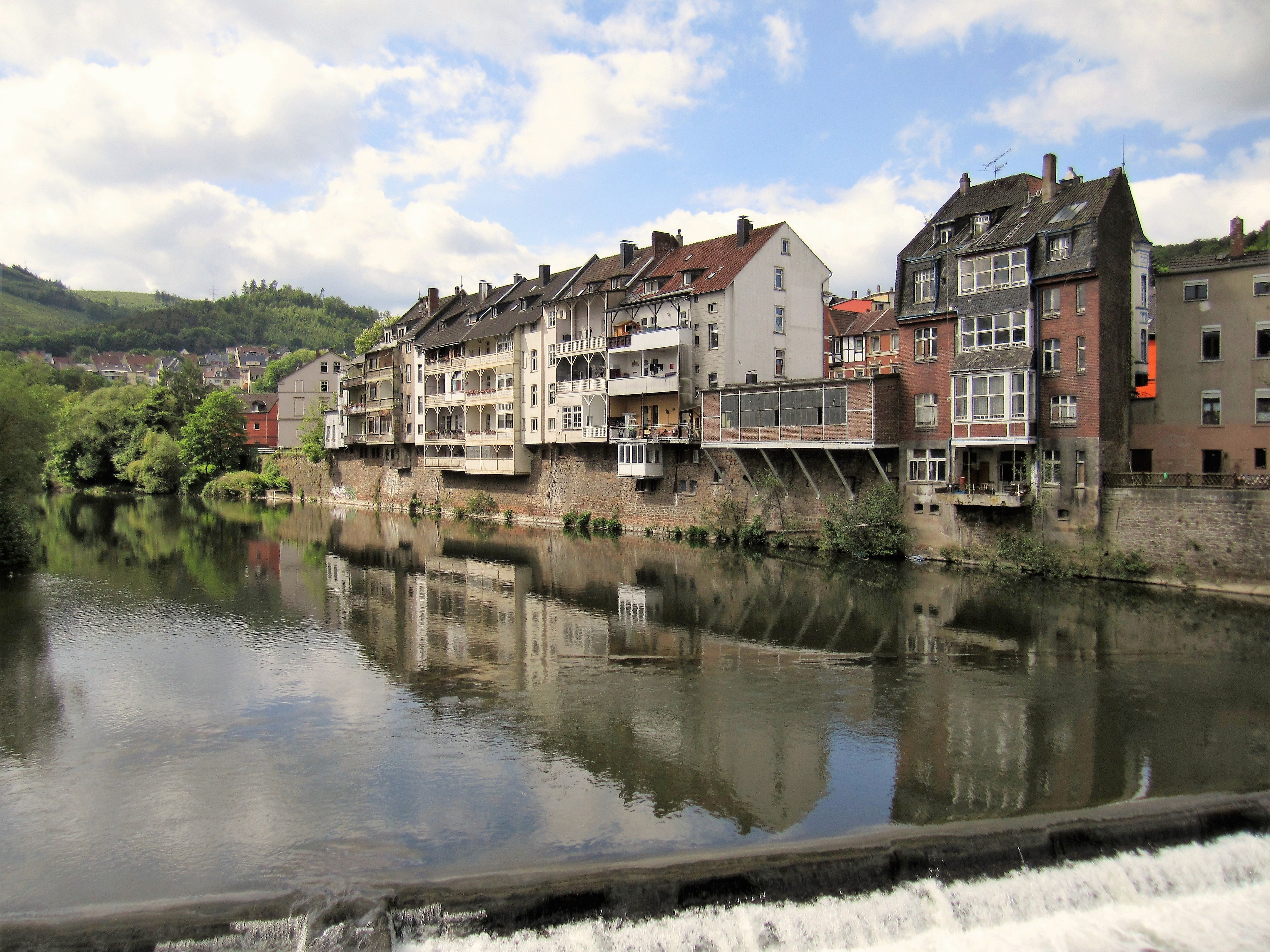 Wohnhäuser an der Lenneuferstraße im Hagener Stadtteil Hohenlimburg. Blick von der Eisenbahnbrücke zwischen Hohenlimburg und dem Ortsteil Oege auf die über der Lenne „hängenden“ Häuser. Im Volksmund liebevoll „Klein Venedig“ genannt.